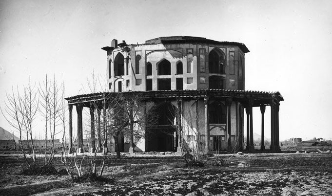 Namakdan kiosk